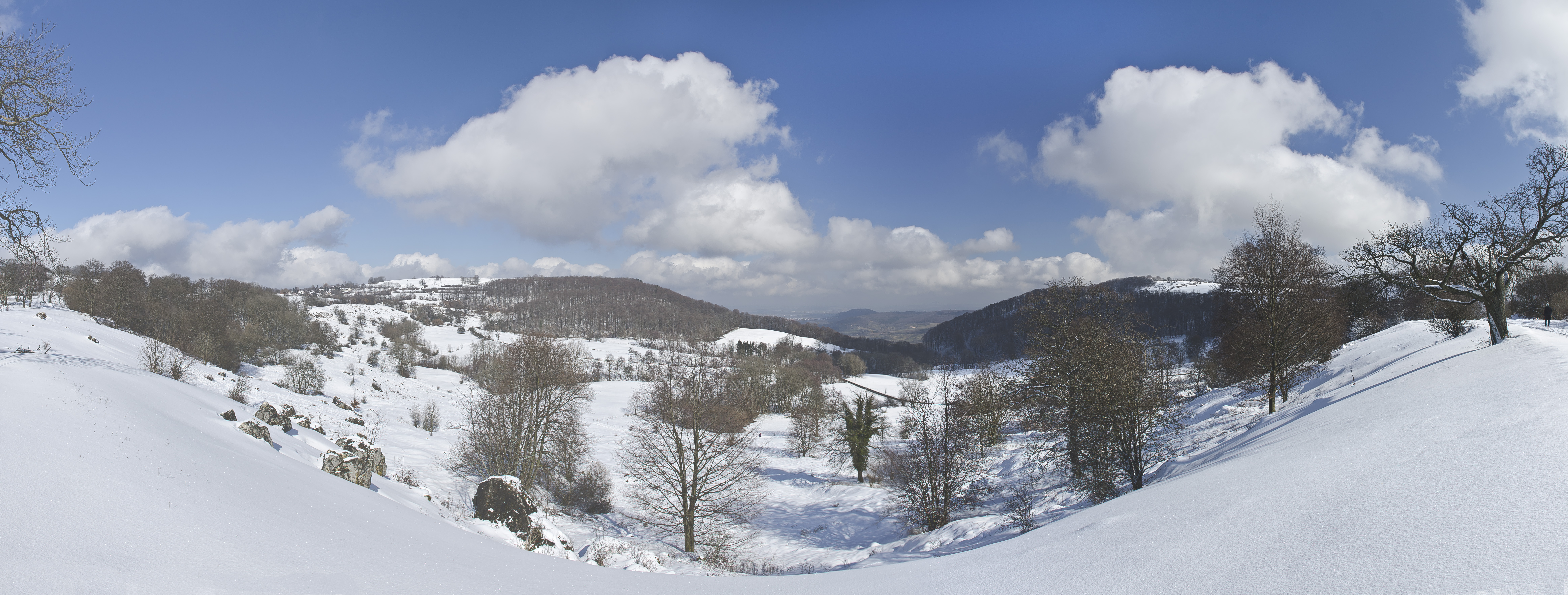 Randecker Maar, Schwäbische Alb. Maar und Umgebung sind eine typische Karst-Landschaft, aber auch als bedeutsames Geotop und Naturschutzgebiet "Randecker Maar mit Zipfelbachschlucht" gesetzlich geschützt. NOTE: This image is a panorama consisting of 7 frames that were merged or stitched in Hugin. As a result, this image necessarily underwent some form of digital manipulation. These manipulations may include blending, blurring, cloning, and colour and perspective adjustments. As a result of these adjustments, the image content may be slightly different from reality at the points where multiple images were combined. This manipulation is often required due to lens, perspective, and parallax distortions.